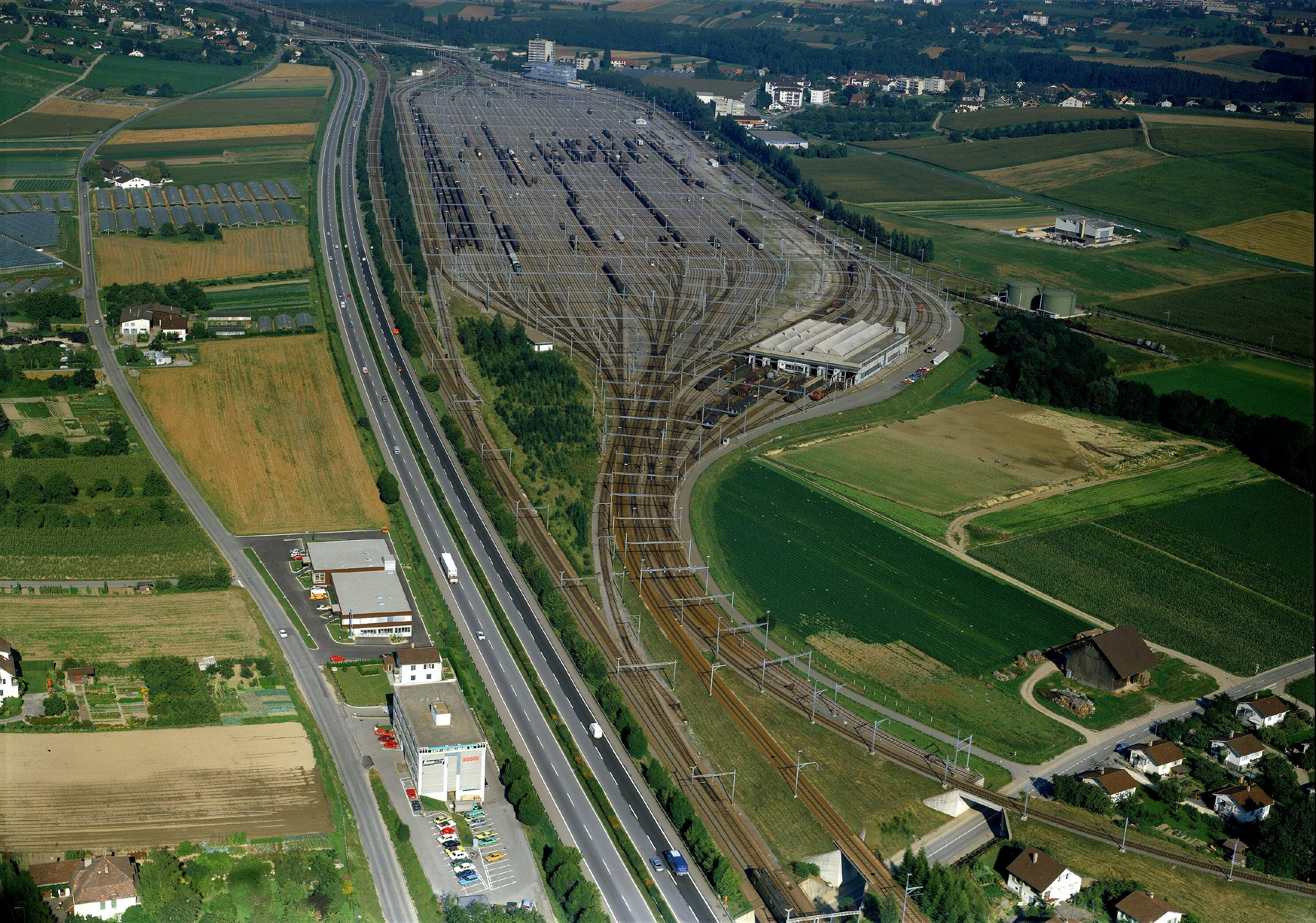 Luftbild des Rangierbahnhofs Lausanne bei Denges